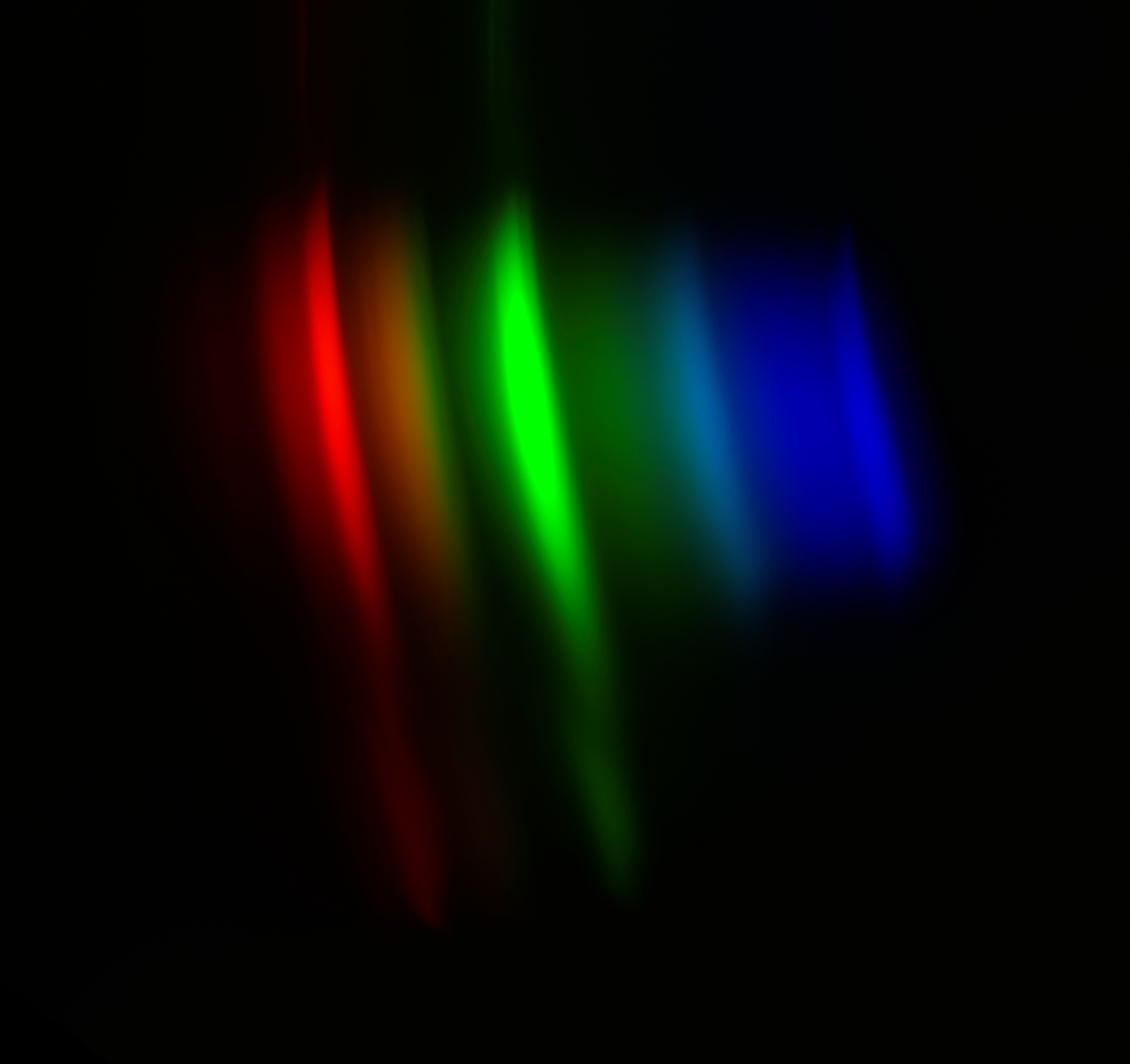 Spectre visible d'une lampe fluocompacte.